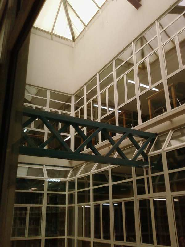 interior_cc_ads